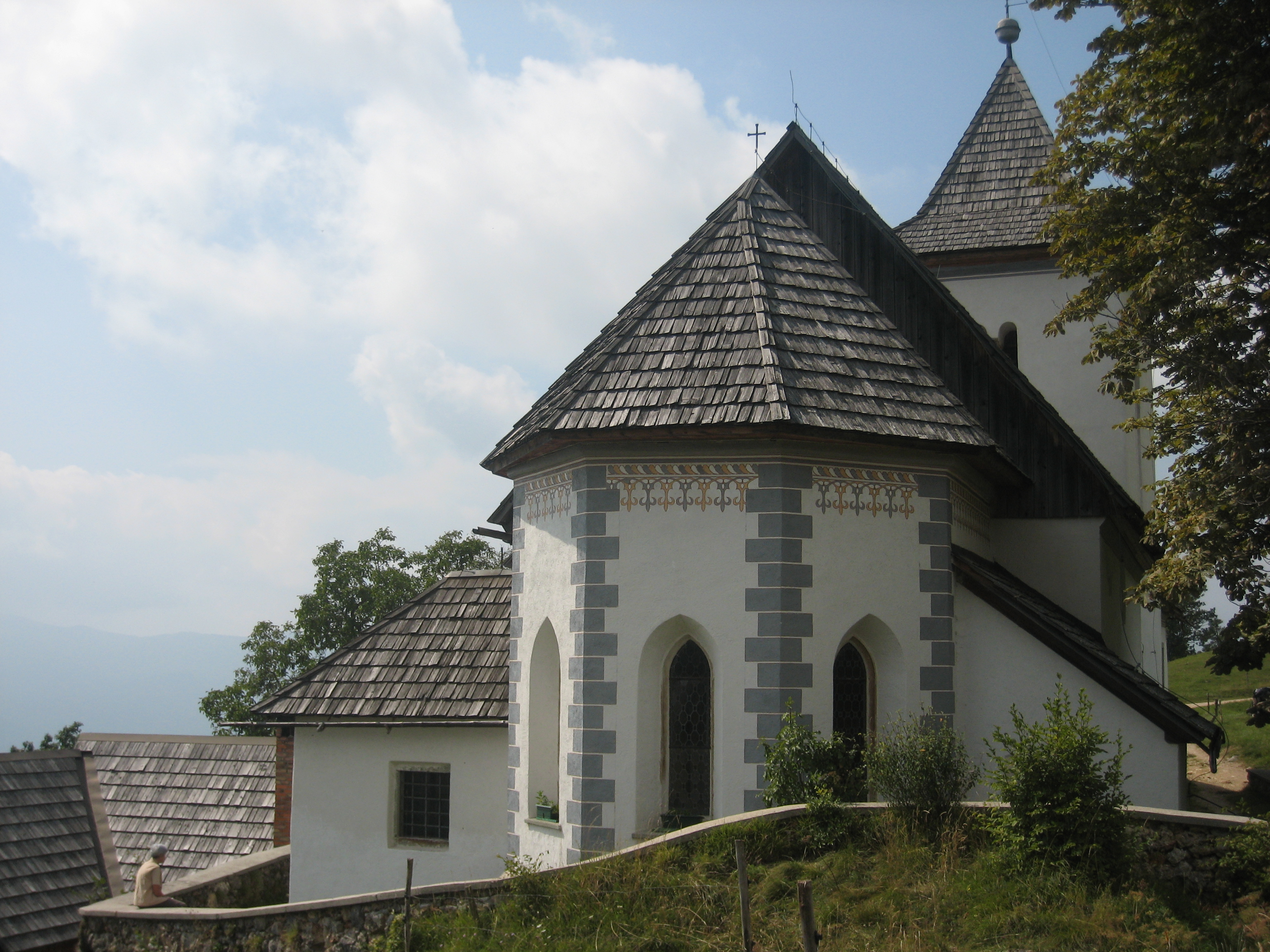 Cerkev sv. Petra nad Begunjami; pogled z vzhodne strani, na prezbiterij